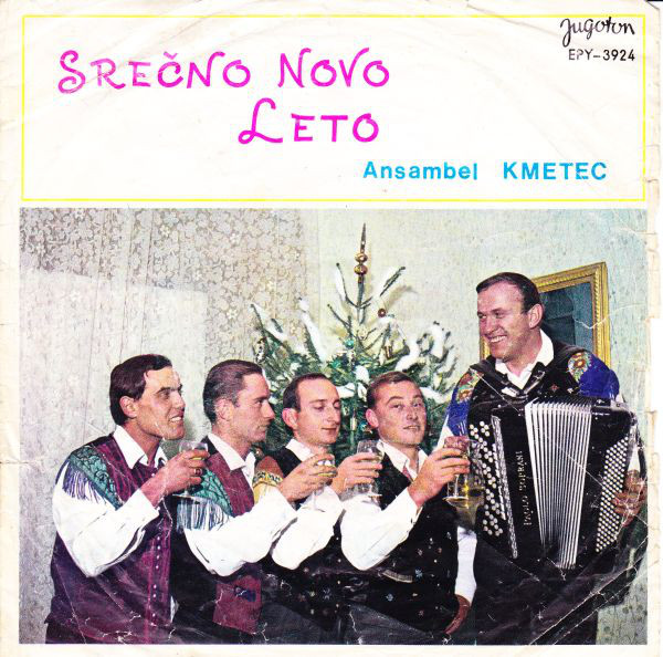 Ansambel Toneta Kmetca - Srečno Novo leto.